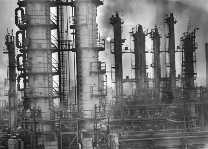 ADN-ZB-Müller-23.12.74-la-Bez. Frankfurt-O.: Im Stammbetrieb des Petrolchemischen Kombinats Schwedt erbringen die über 7600 Werktätigen bedeutende Leistungen für unsere Volkswirtschaft. Tag und Nacht arbeiten die Destillations- und Extraktionskolonnen, wie hier in der Aromatenanlage, um sowjetisches Erdöl mit höchstem Nutzeffekt für unsere Volkswirtschaft aufzubereiten. Die hier erzeugten chemischen Grundprodukte dienen als wichtige Grundstoffe für Dederon, Buna S, Polyesterfasern, Waschmittel, Farbstoffe und Arzeneimittel u.a.m.